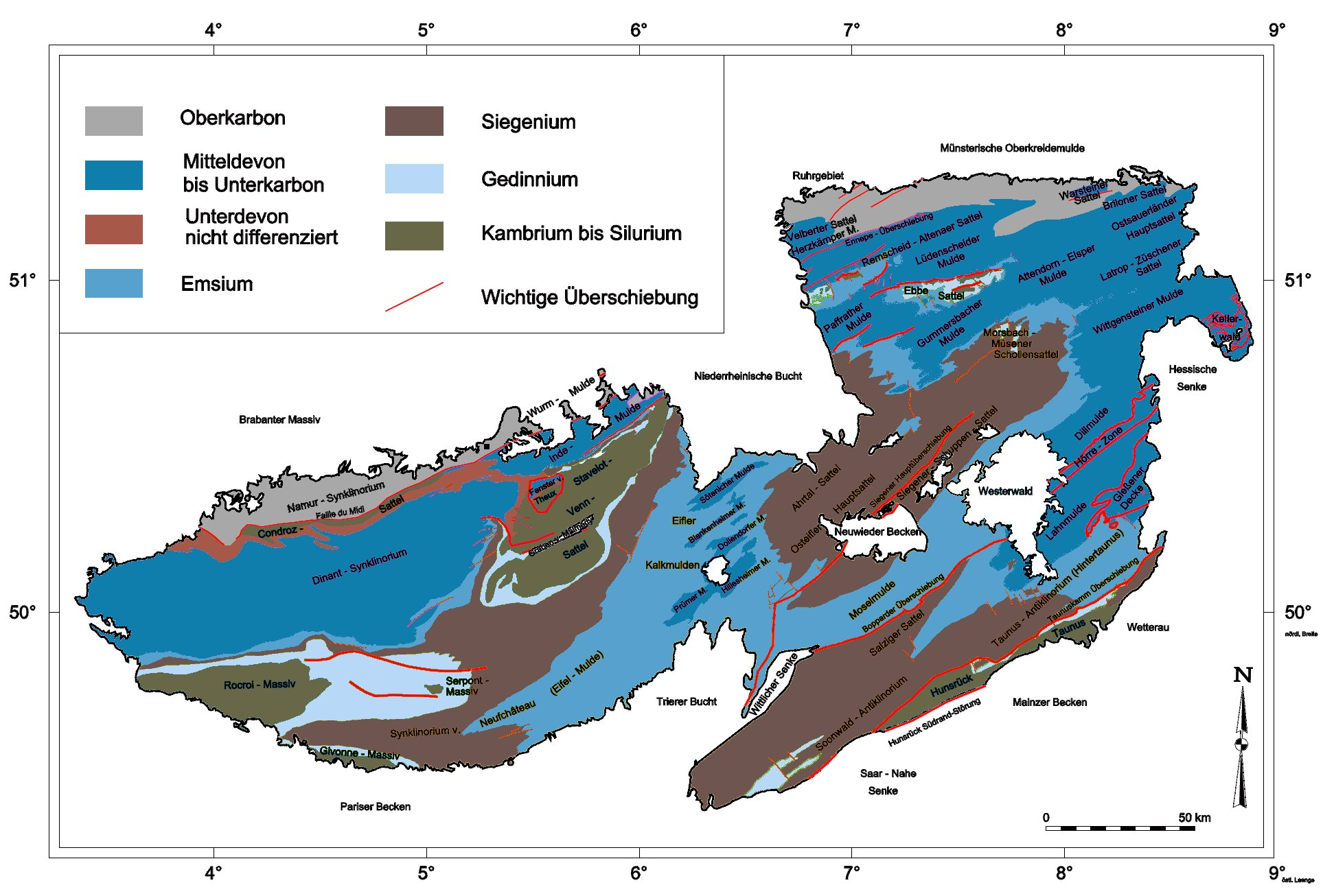 Geologische Karte des Rheinischen Schiefergebirges mit Benennung der Großstrukturen nach Walter 1992.